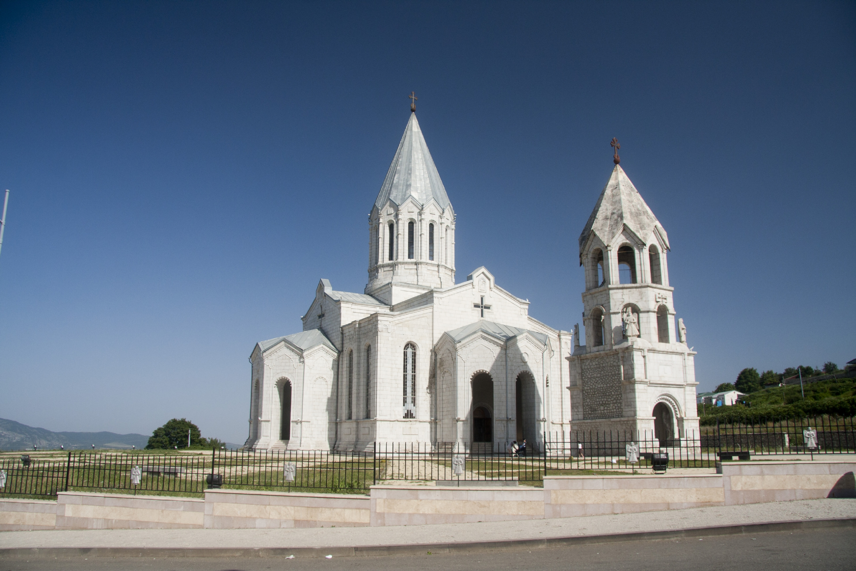 Շուշի Ղազանչեցոց Եկեղեցի